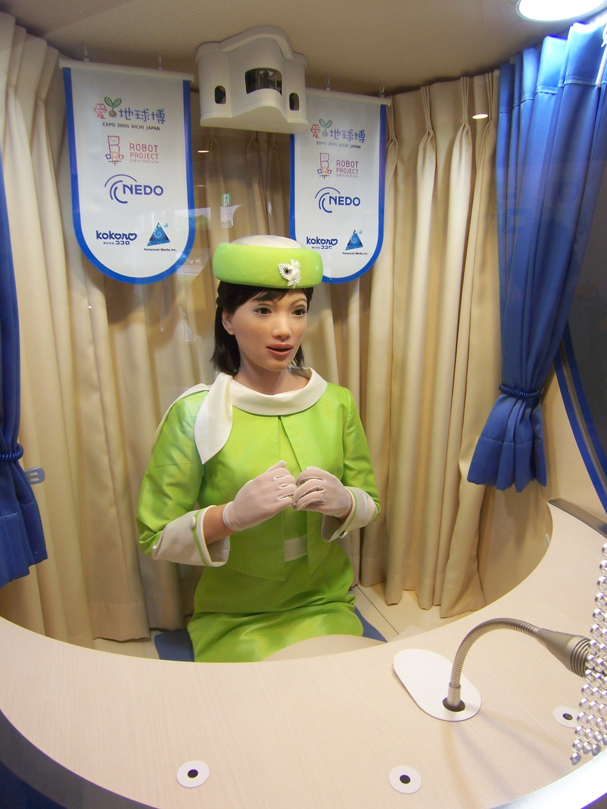 Actroid